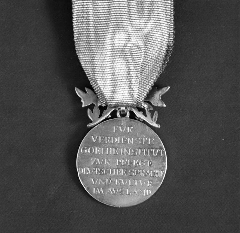 Orden im Besitz von Bundespräsident Walter Scheel Goethe-Medaille am Bande